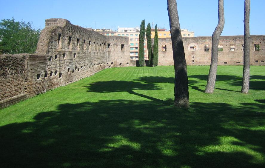 Ruinen der frühchristlichen Basilika neben St.Agnes fuori le mura in Rom